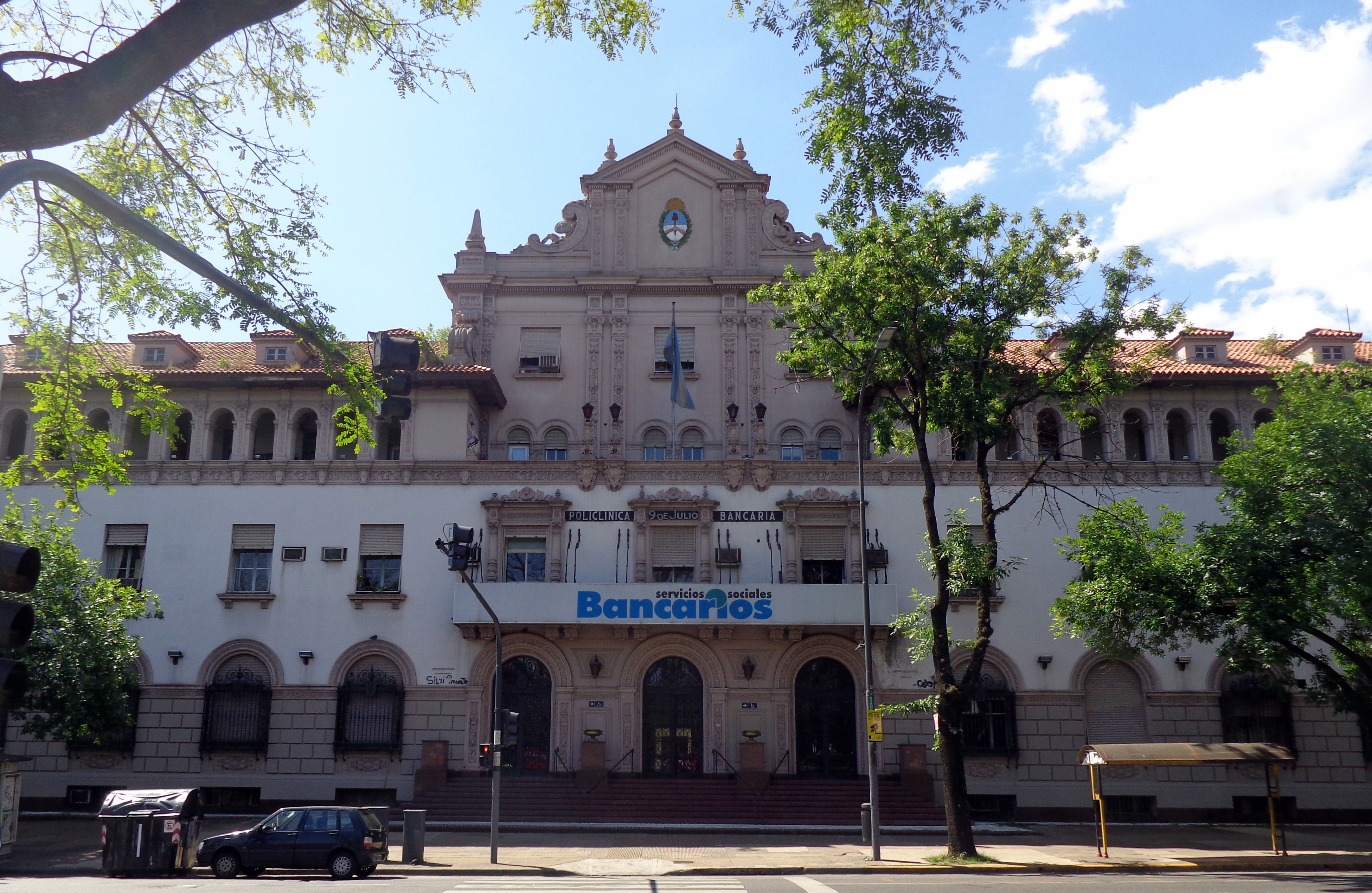 Iba a ser el Hospital Pediátrico Español, pero por pedido de Eva Perón a Franco pasó a ser el Policlínico Bancario. Arquitecto Antonio Bilbao La Vieja (1892-1980). Gaona 2197, Buenos Aires, Argentina.